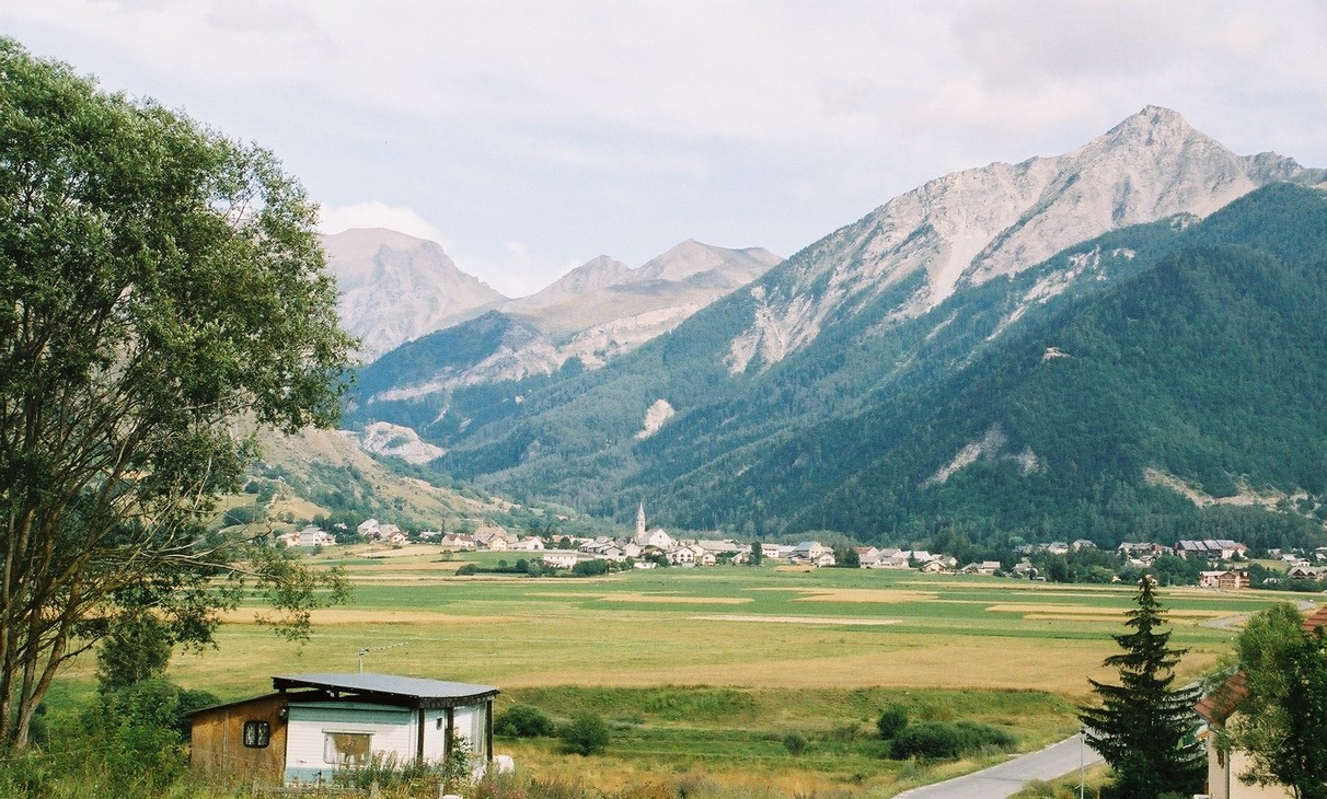 La plaine d'Ancelle et la vallée de la Rouanne vues du hameau de St Hillaire (commune d'Ancelle). Le village est surplombé par l'aiguille d'Ancelle. Au fond de la vallée pointe le sommet de la Coupa.